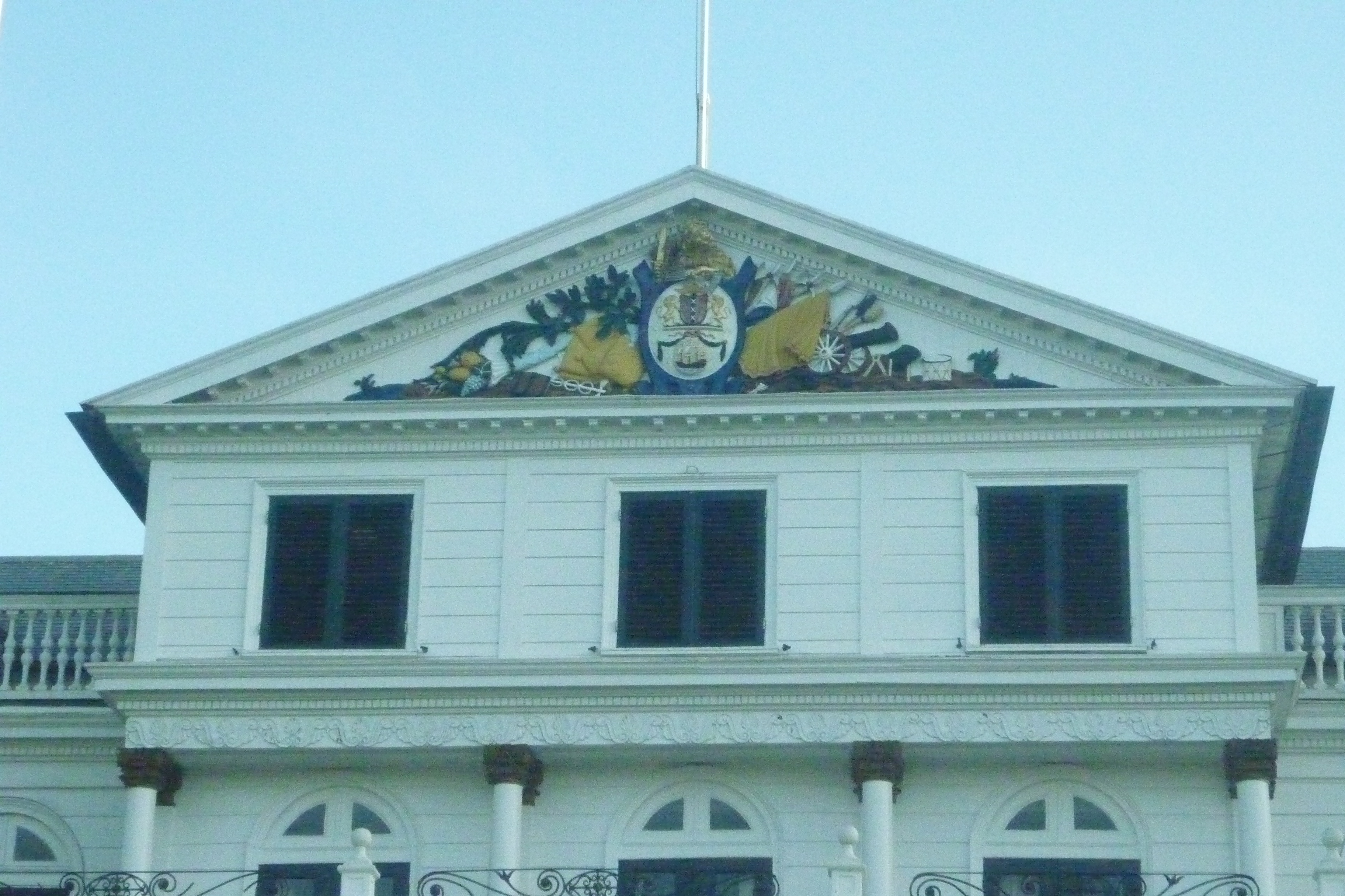 Gouverneurshuis in Paramaribo (fronton)